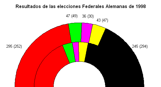 Imagen creada por user:Willhsmit como Image:1998 federal german result.png con licencia de dominio publico. El titulo fue modificado al español.